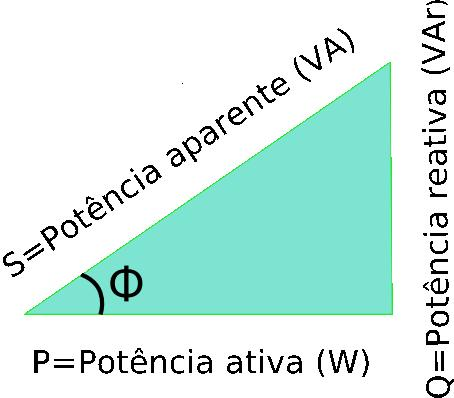 Triângulo de potência